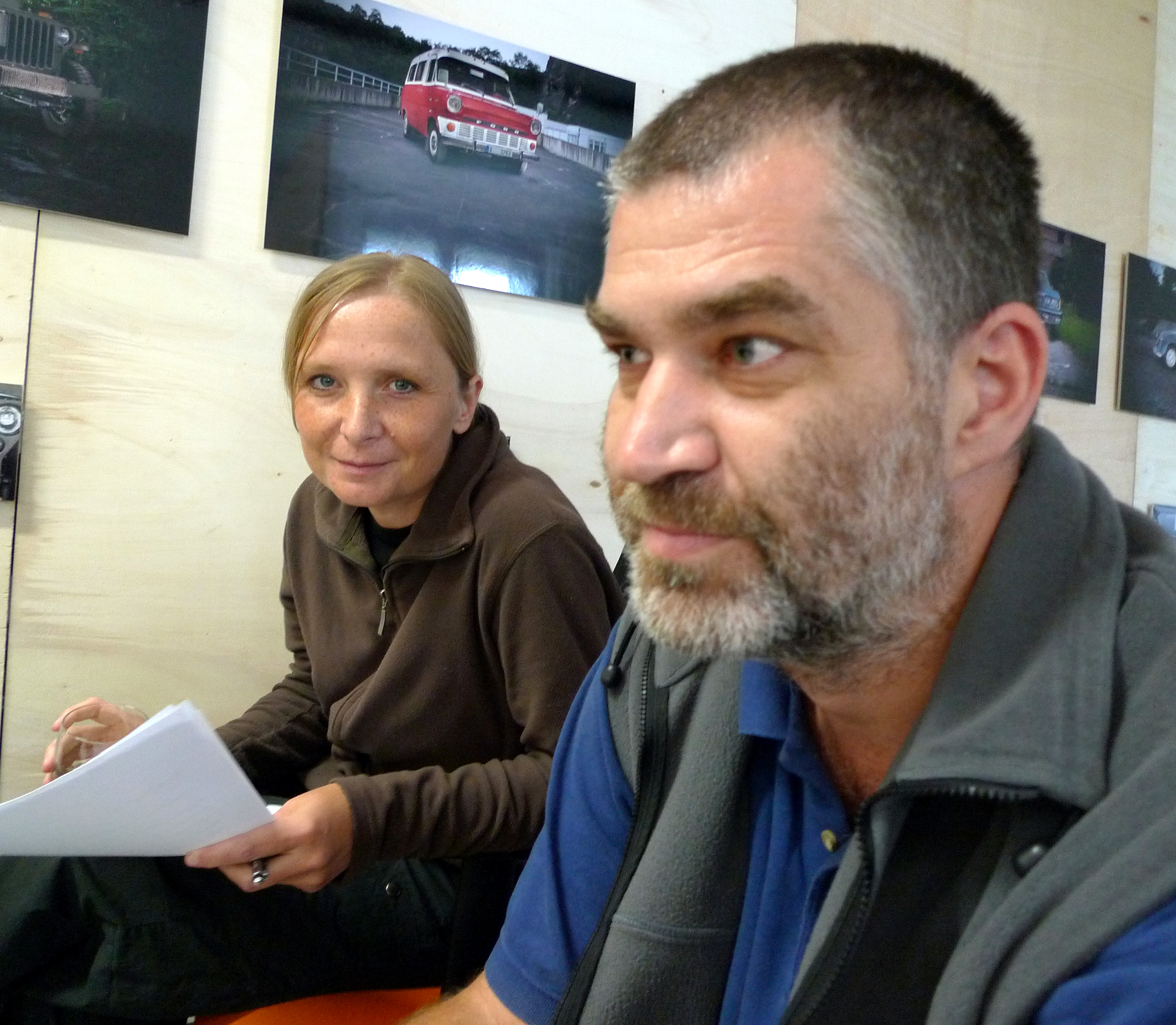 Alena Dvořáková and Viktor Fischer - Czech photographers.